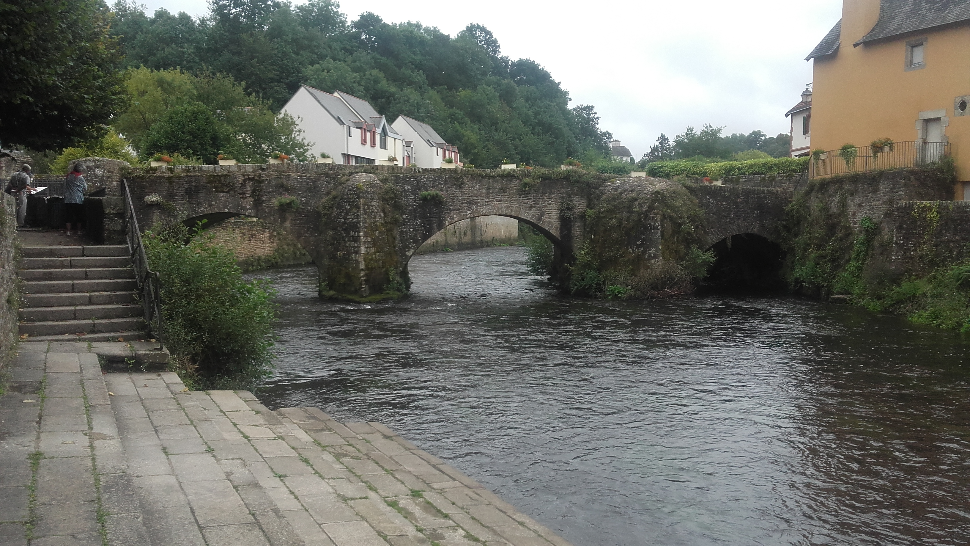 Le pont Lovignon franchissant la rivière Ellé à Quimperlé